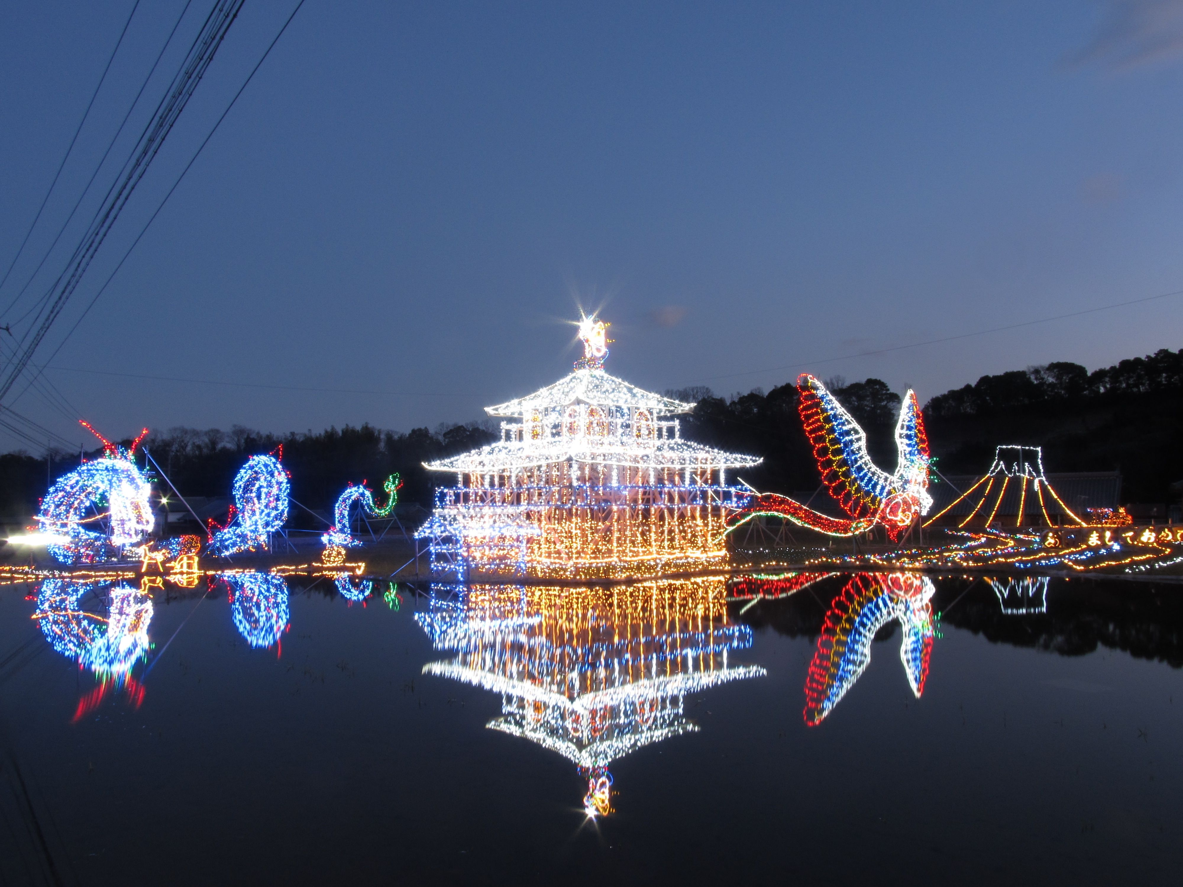 ABIイルミネーションの代表作